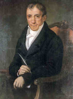 Αδαμάντιος Κοραής